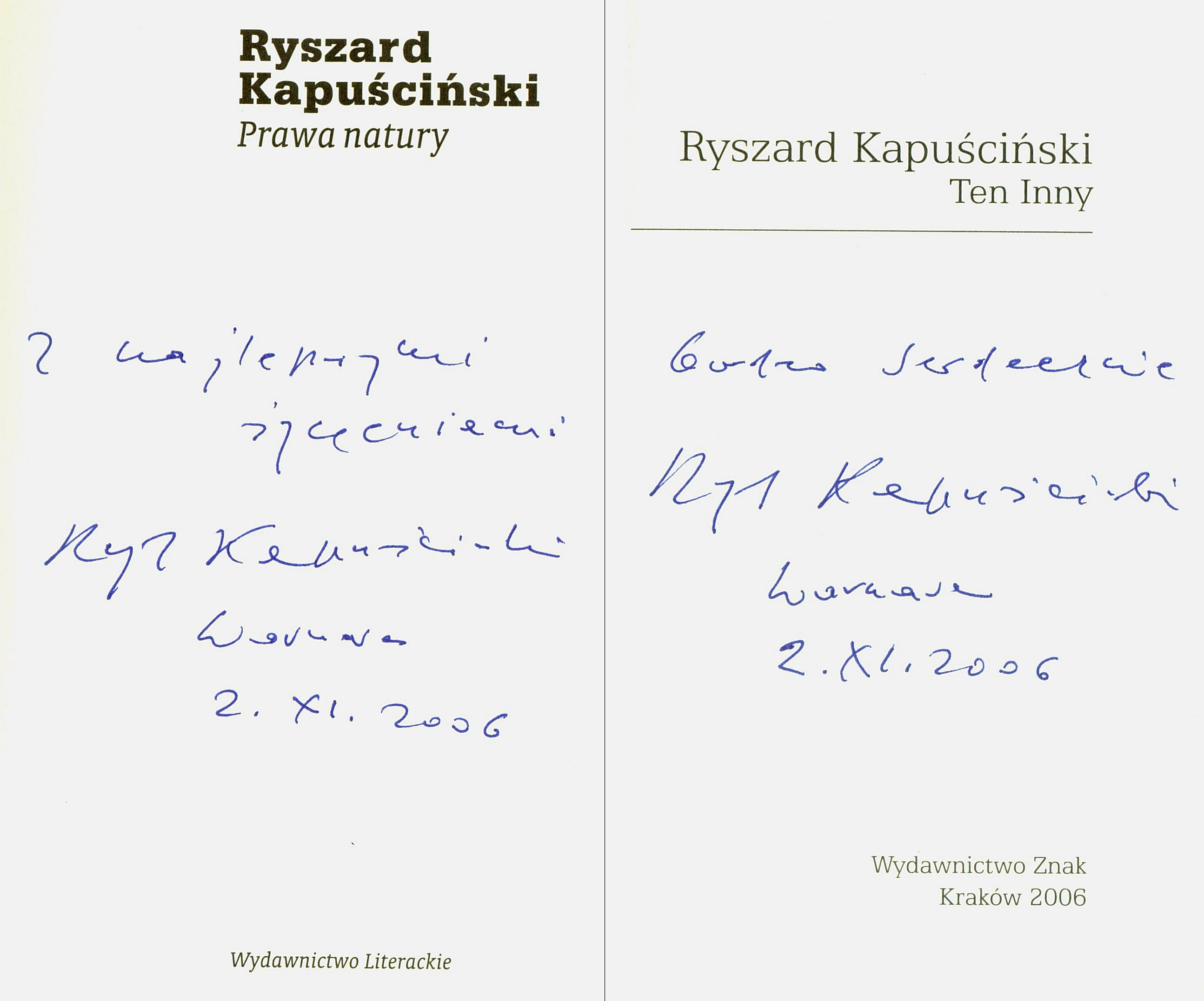 Ryszard Kapuściński's autographs